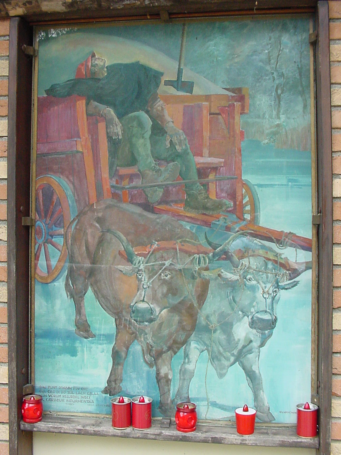 Edicola del Caradùr indurmentaa, presso il Lago del Segrino. Dipinto della Cappella del carrettiere.